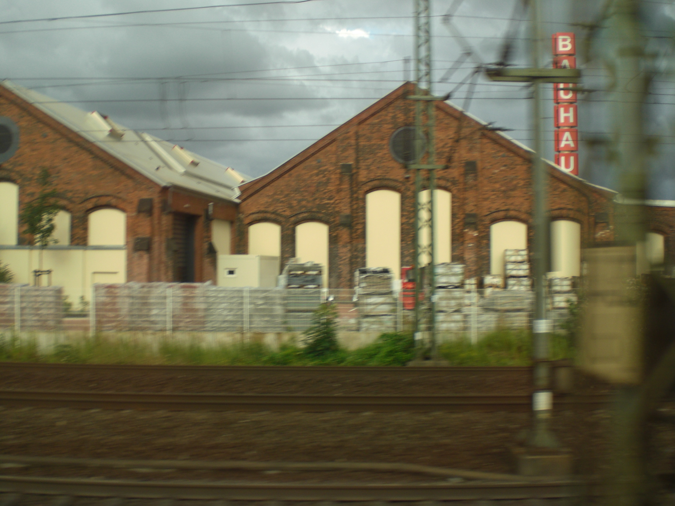 früheres Ausbesserungswerk Harburg, Hamburg, jetzt Baumarkt. Aufnahme aus fahrendem IC